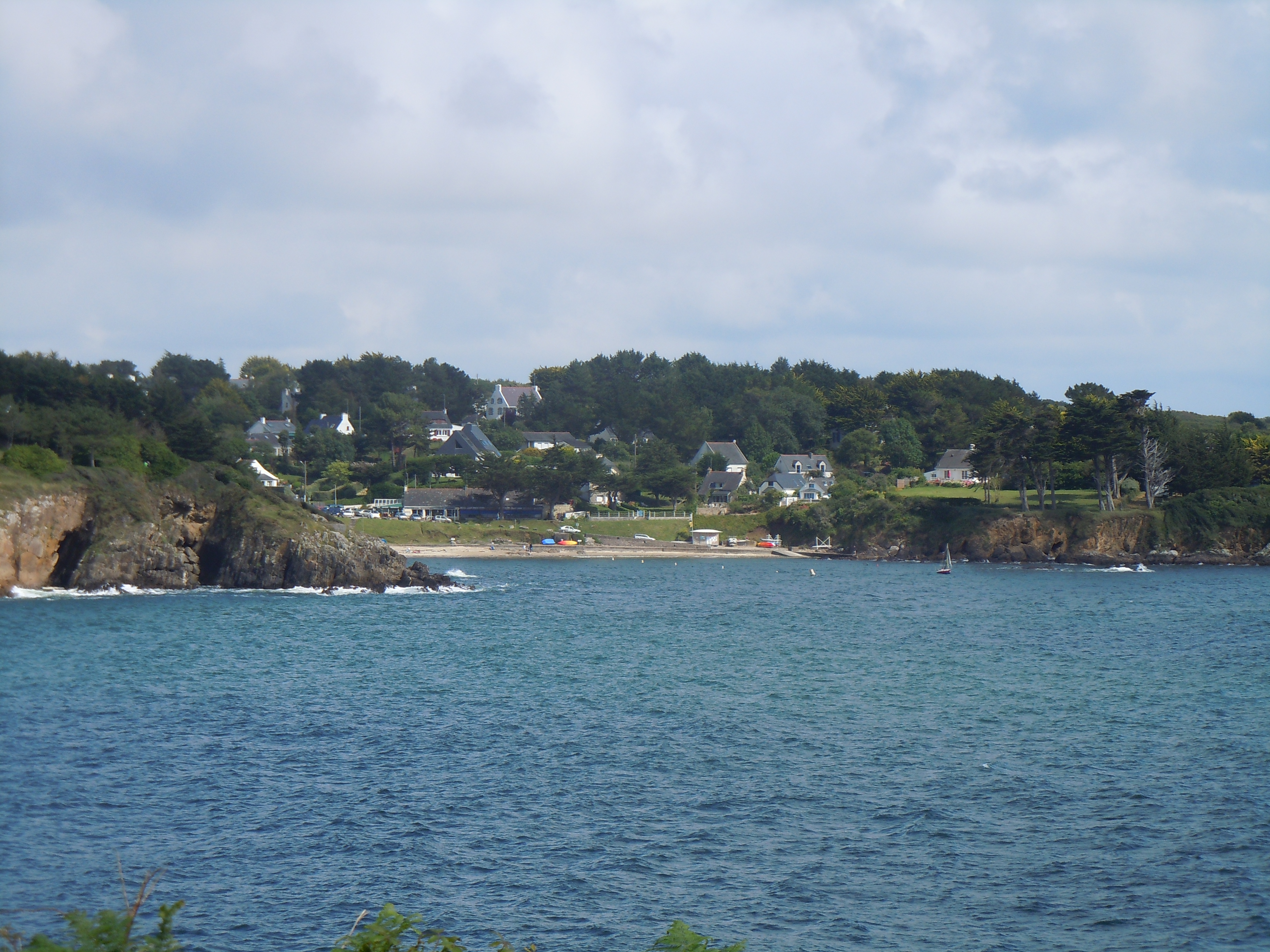 la plage de Kerfany-les-Pins en Moëlan-sur-Mer ( département du Finistère ) vue depuis la pointe de Penquernao en Riec-sur-Belon.